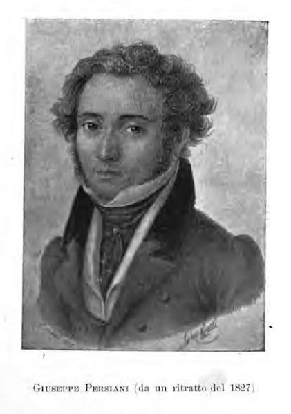 compositore italiano